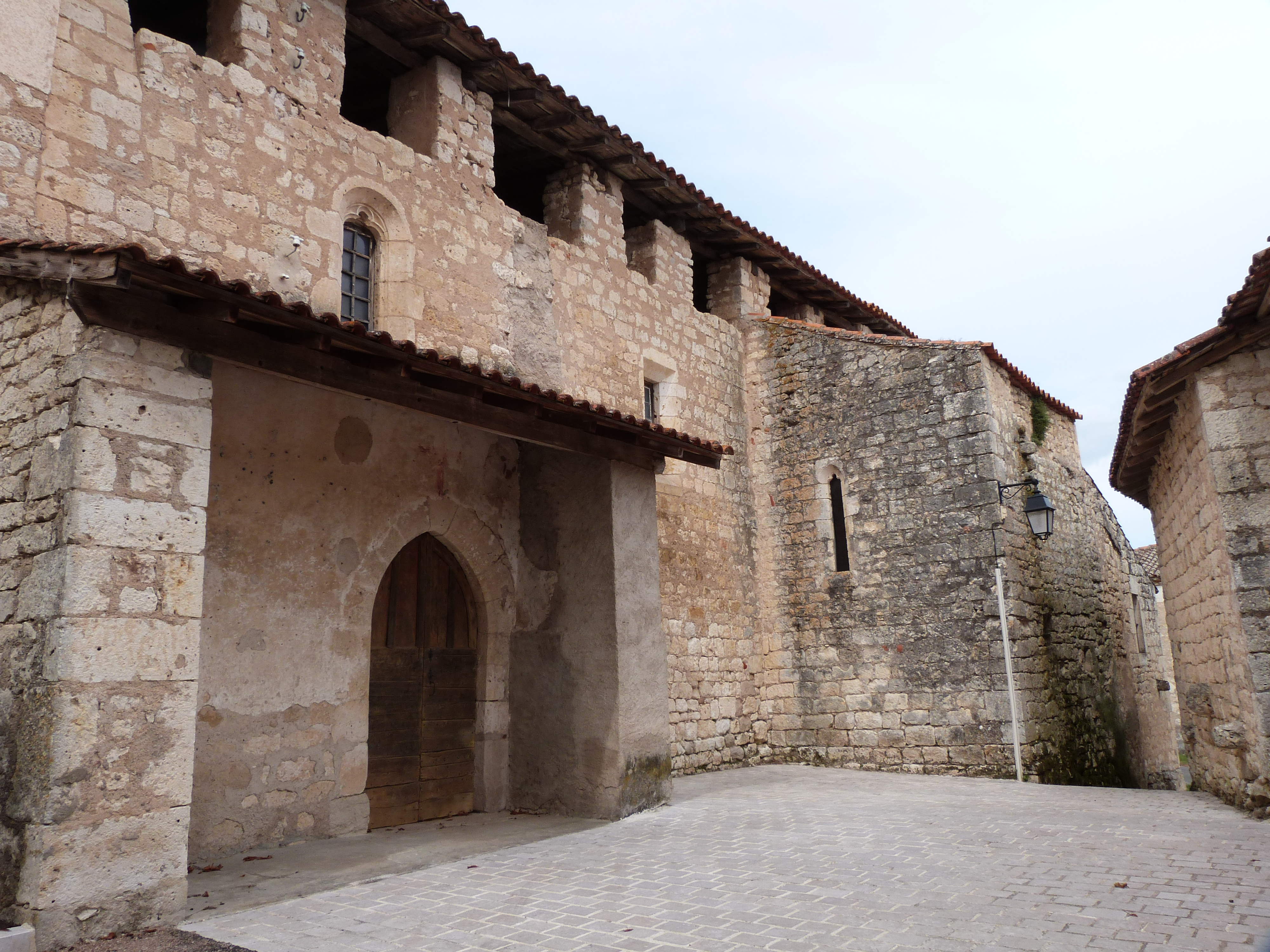 Église Saint-Denis de Loubers